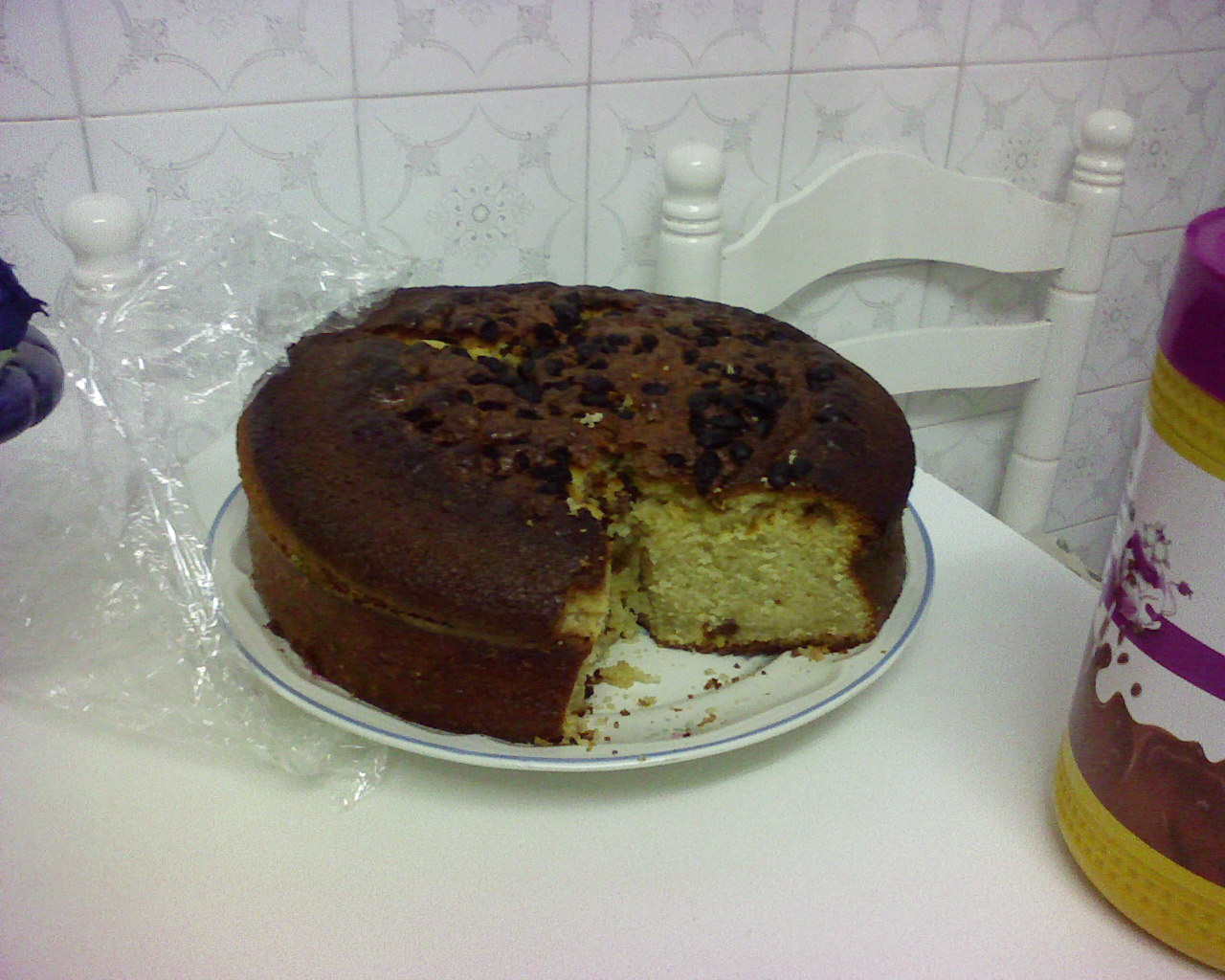 Budin